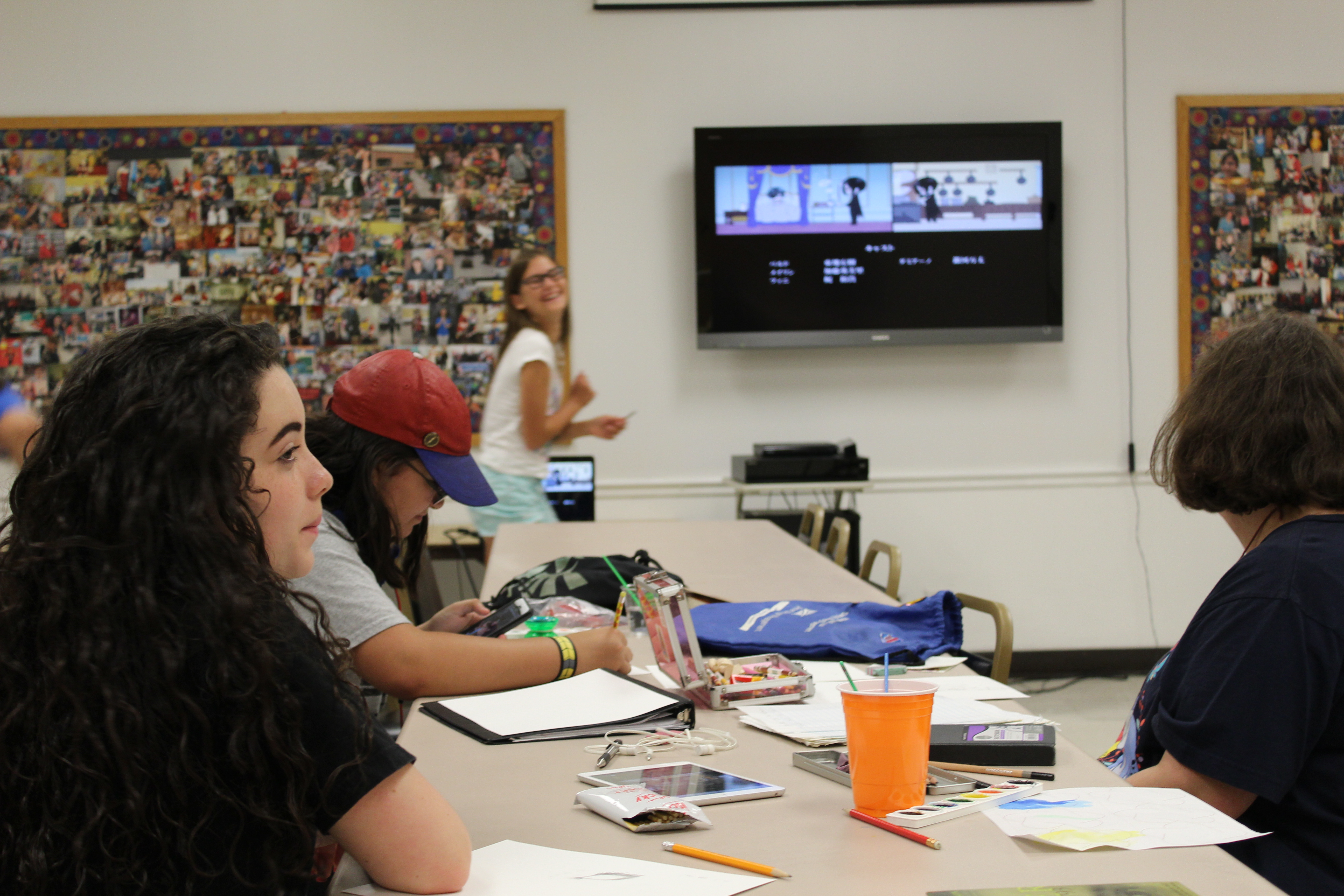 Anime Club 2015